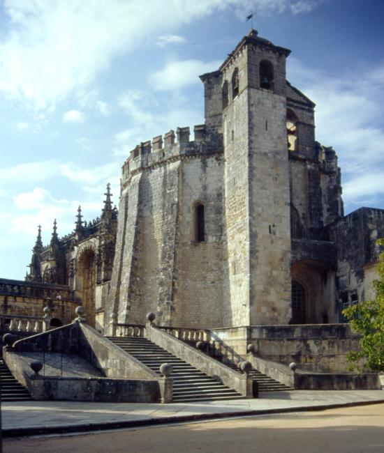 Südansicht Kreuzritterburg Tomar Andere Versionen: Claustro dos Felipes